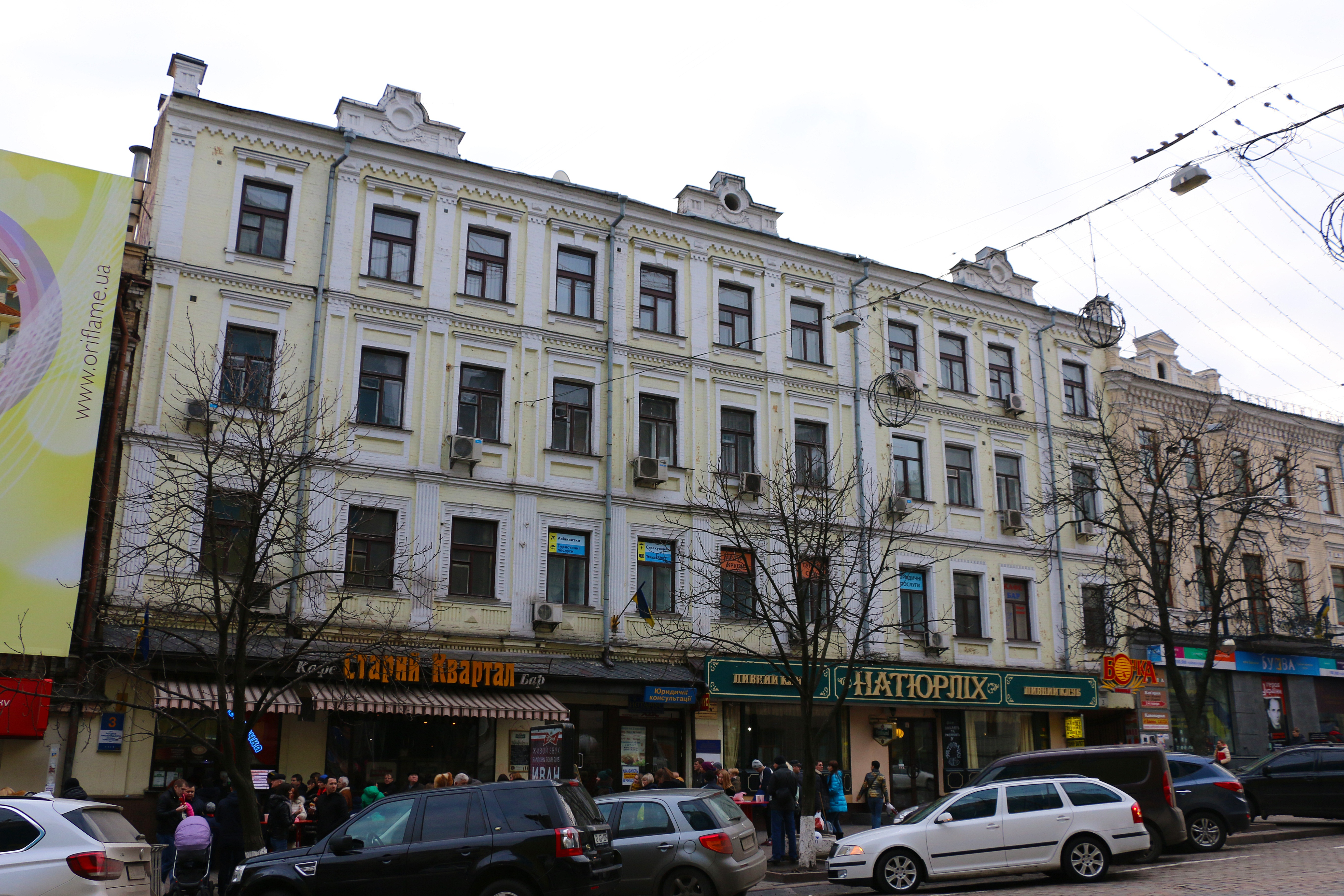 Будинок прибутковий житловий з готелем, Київ, Хмельницького Богдана вул., 3